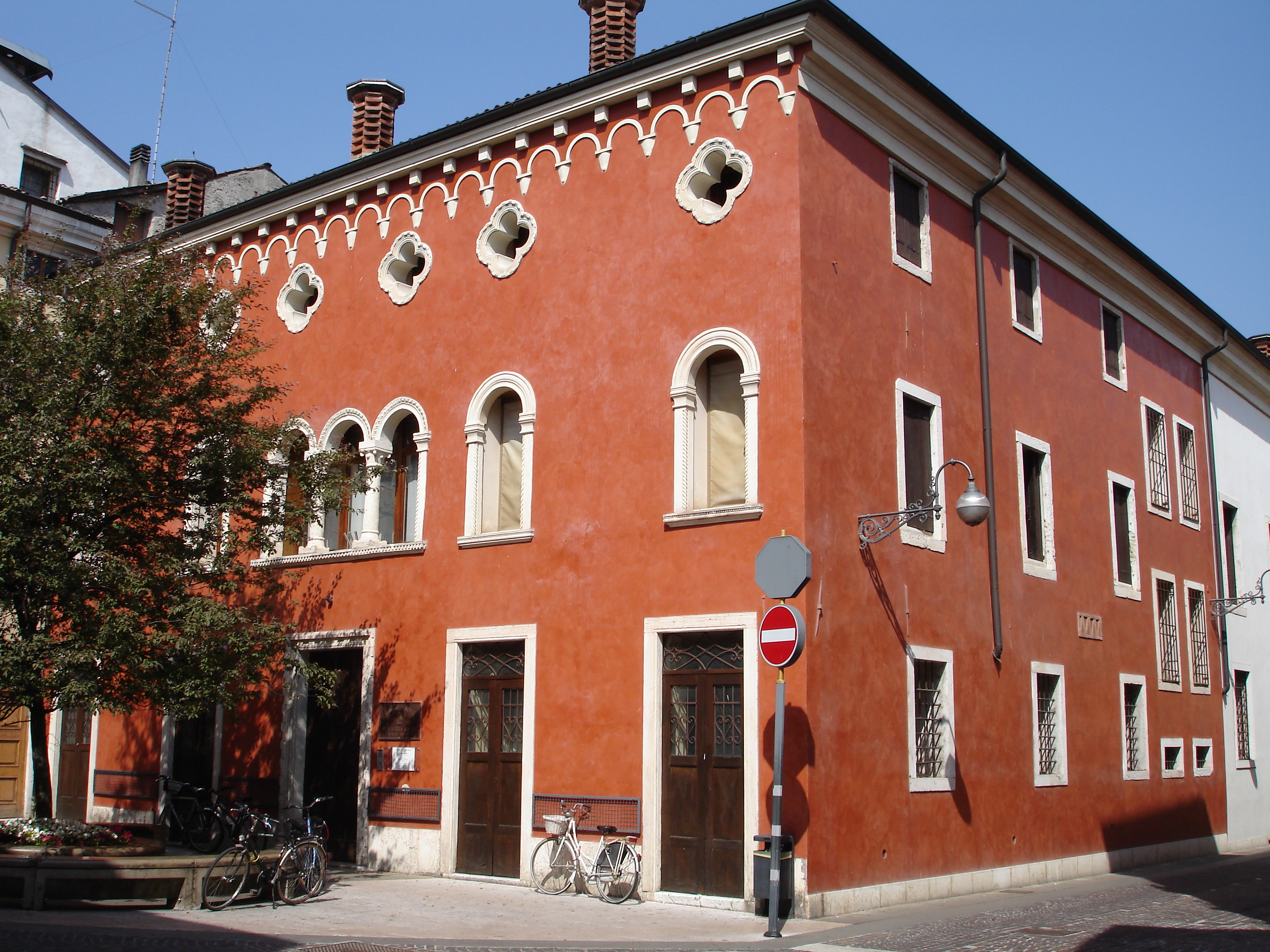 Schio, Biblioteca Civica R. Bortoli This is a photo of a monument which is part of cultural heritage of Italy.